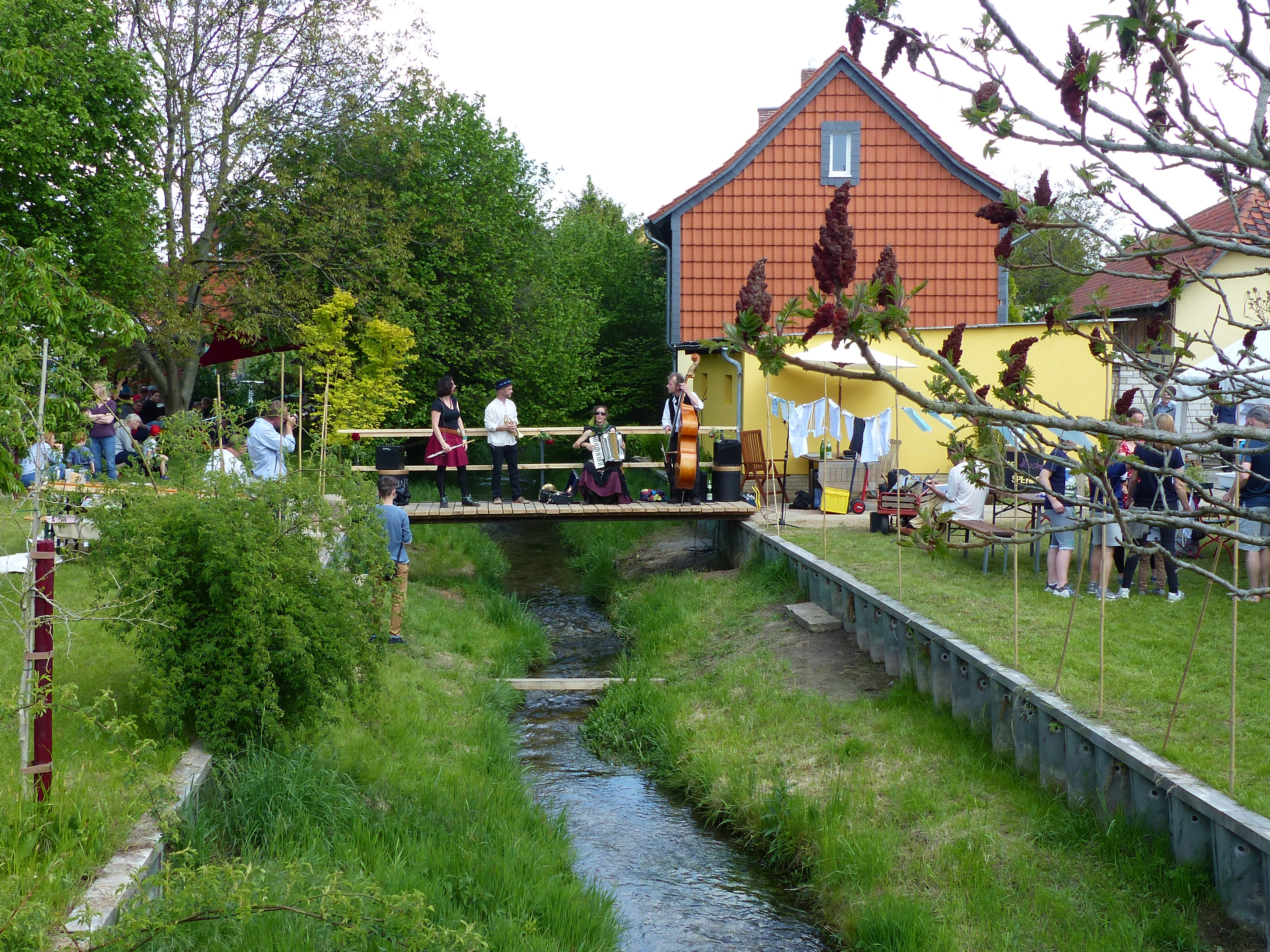 Die Gruppe Zuna Rota spielt auf dem Schuntersteg in Frellstedt anlässlich des Festes zur Eröffnung der Gewässerwoche 2019 unter dem Thema "Alles im Fluss". Rechts auf der Wiese Angebote für Kinder des Frelle e. V.